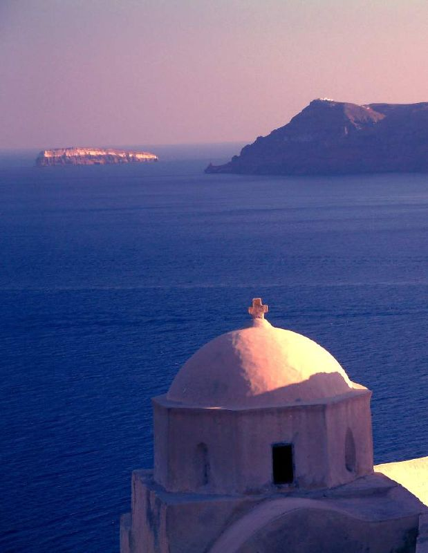 Blue Sea Santorini Island